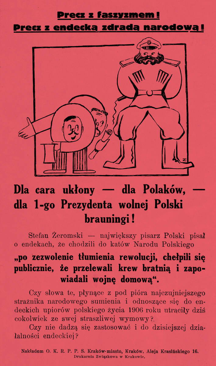 Ulotka Polskiej Partii Socjalistycznej łącząca śmierć prezydenta Gabriela Narutowicza z kolaboracją Narodowej Demokracji z zaborcą i walkami bratobójczymi doby rewolucji 1905 roku